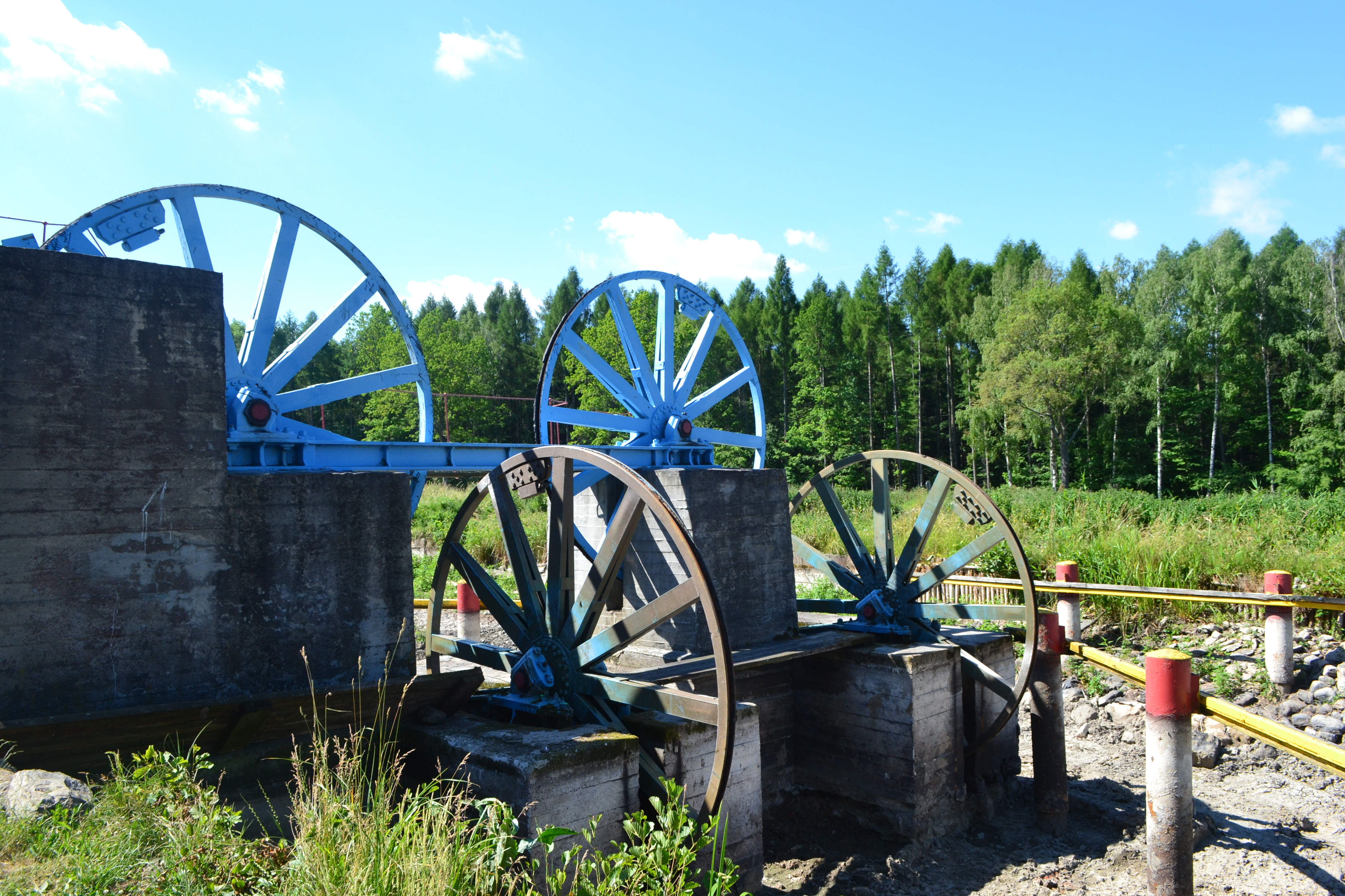 Pochylnia Kąty w zespole Kanału Elbląskiego